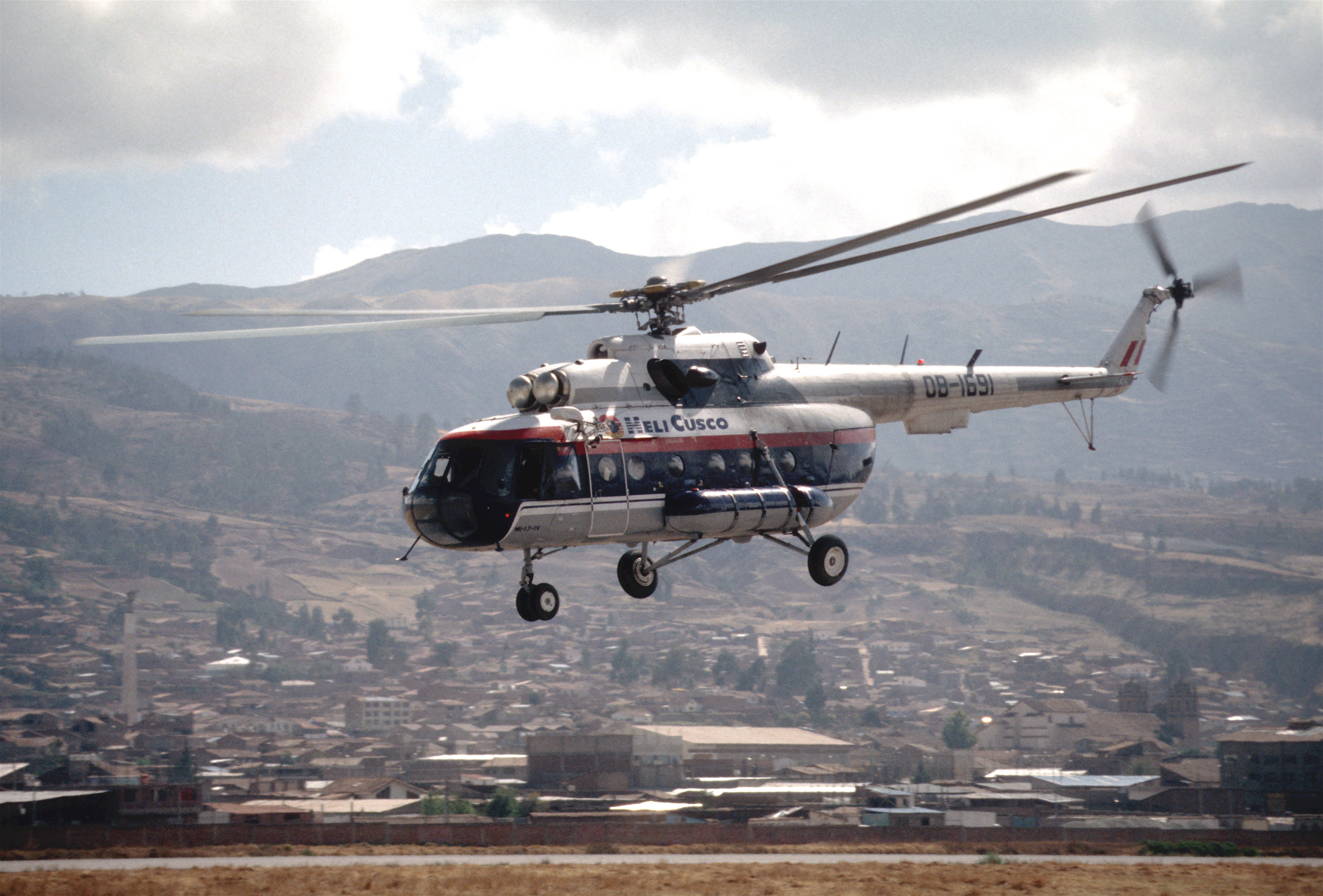 110bc - Heli Cusco Mil Mi-17; OB-1691@CUZ;29.09.2000